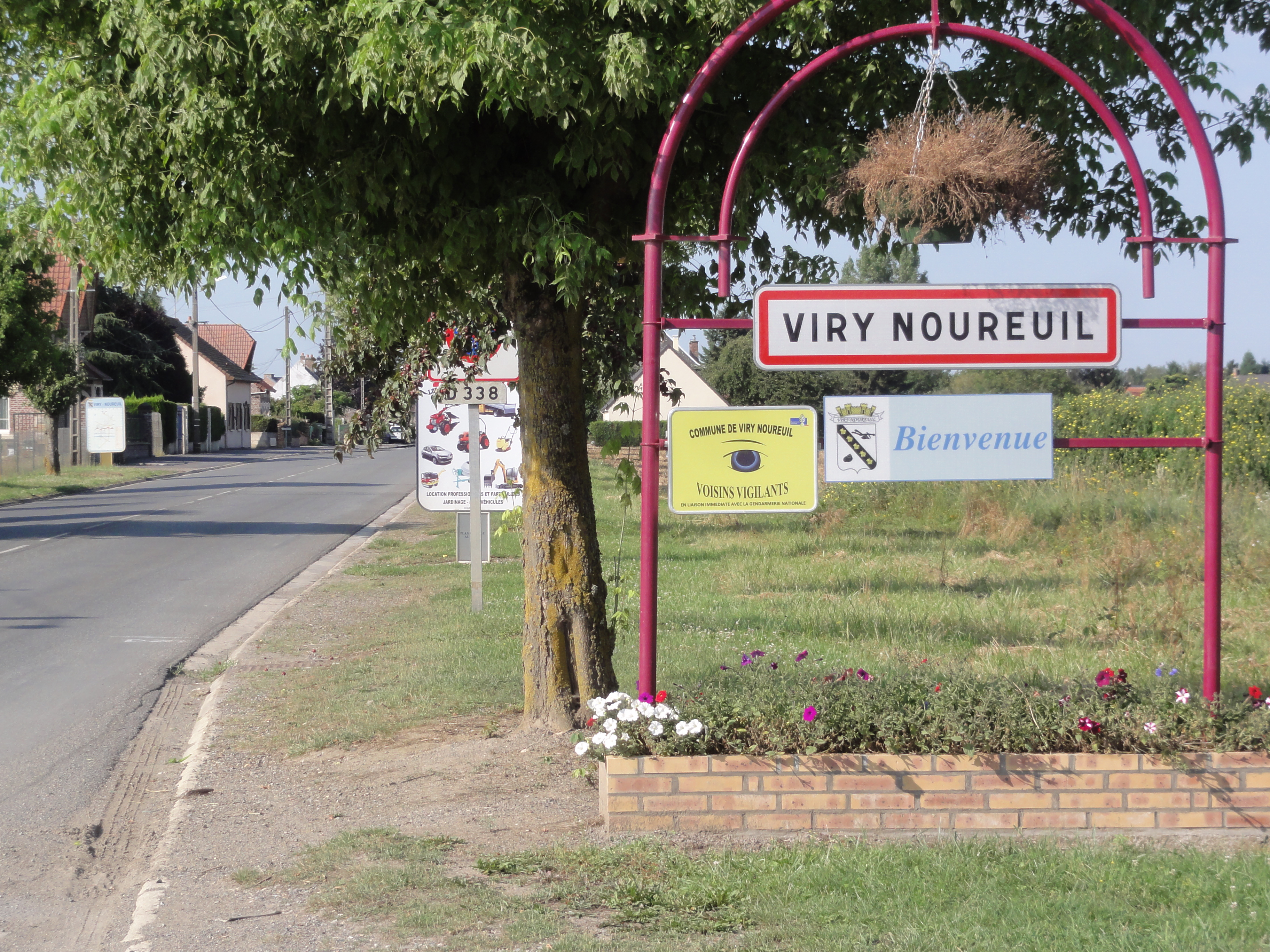 Viry-Noureuil (Aisne) city limit sign